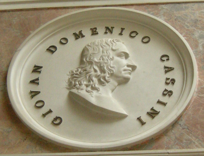 Tribuna, medaglione di giovan domenico cassini